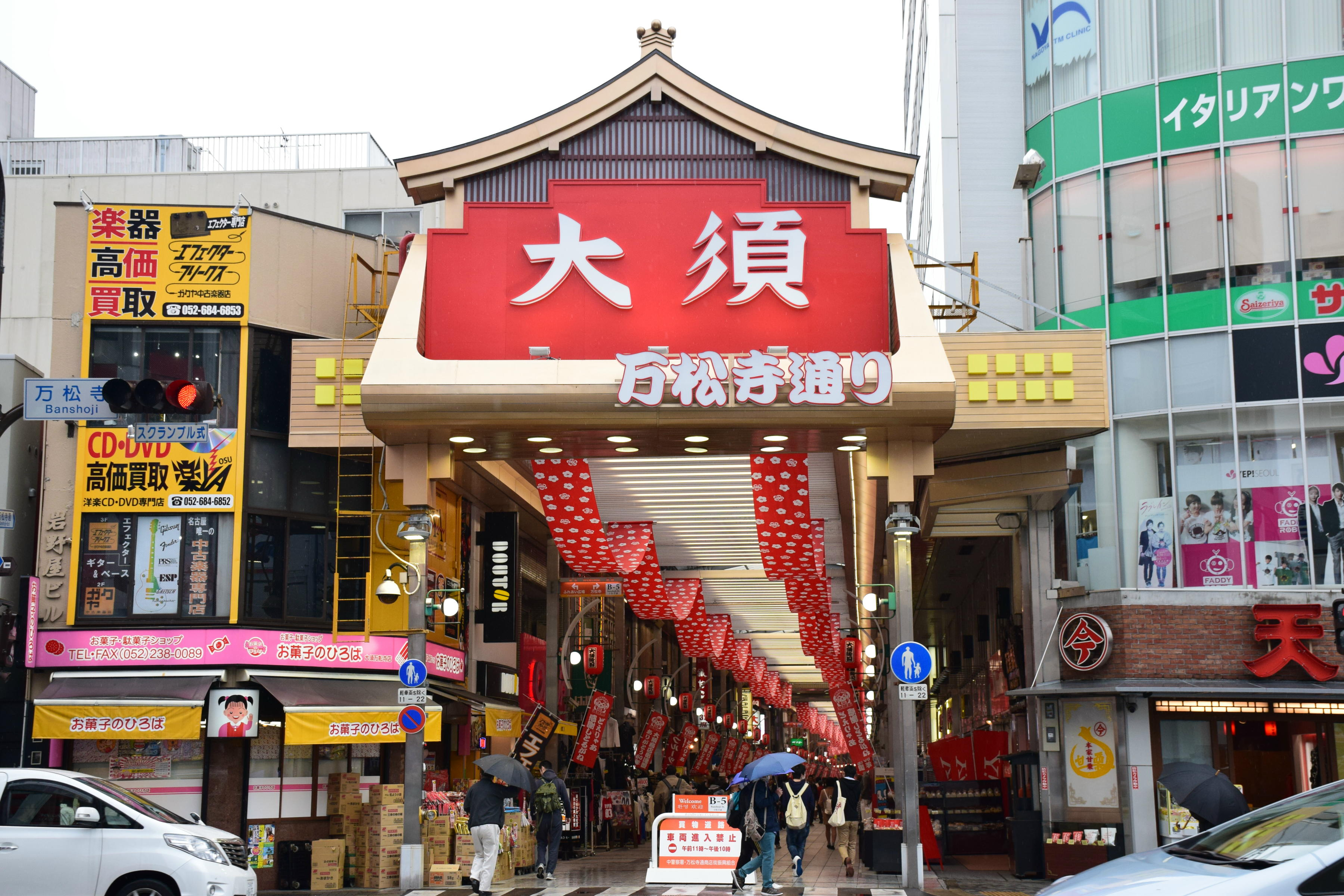 大須商店街